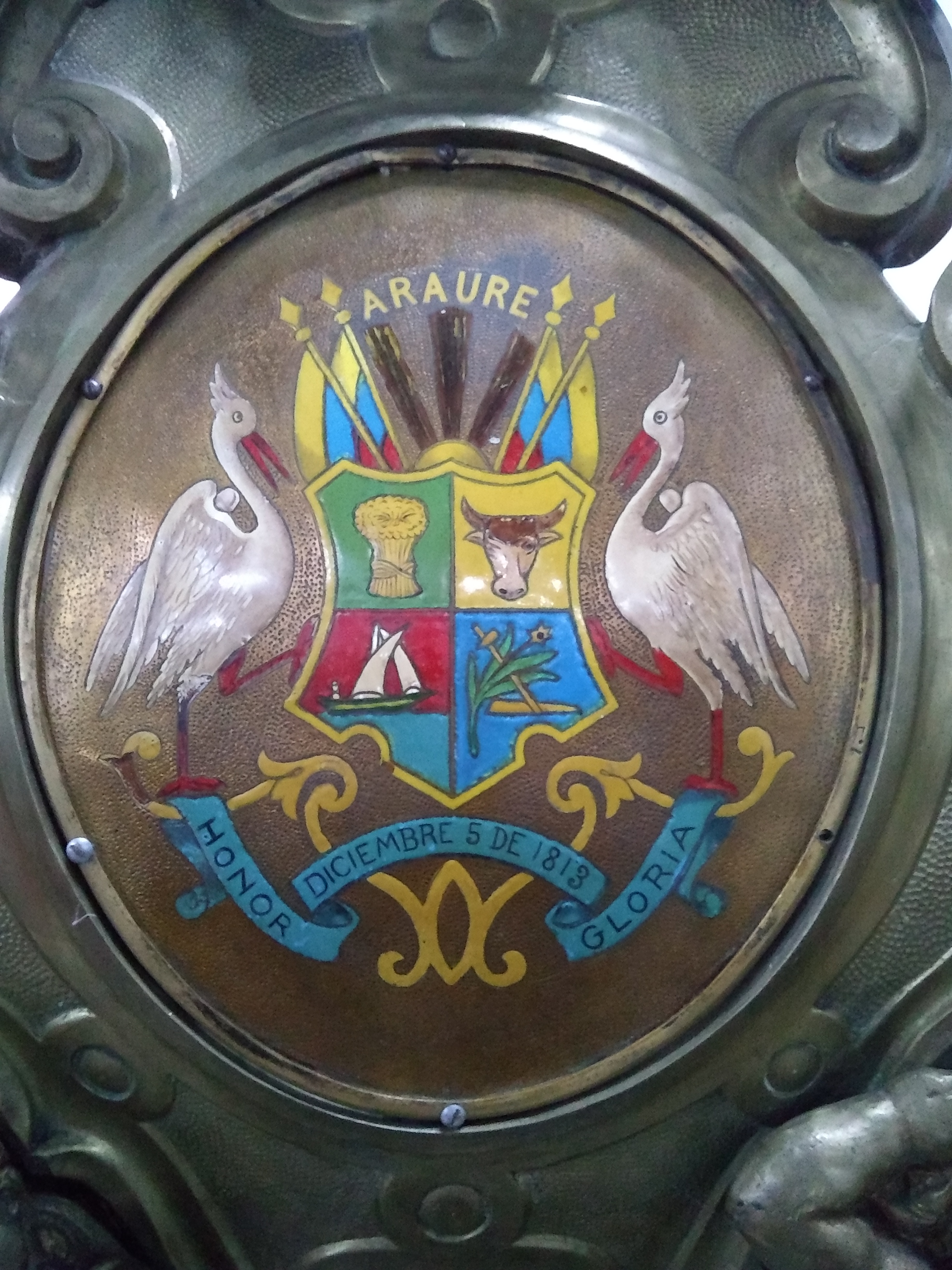 Imagen del Escudo de Armas del Estado Portuguesa, encontrado en la Iglesia Catedral de Guanare.